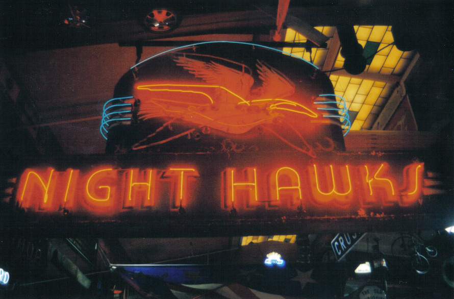 sign at dort mall (Minolta X-700 )